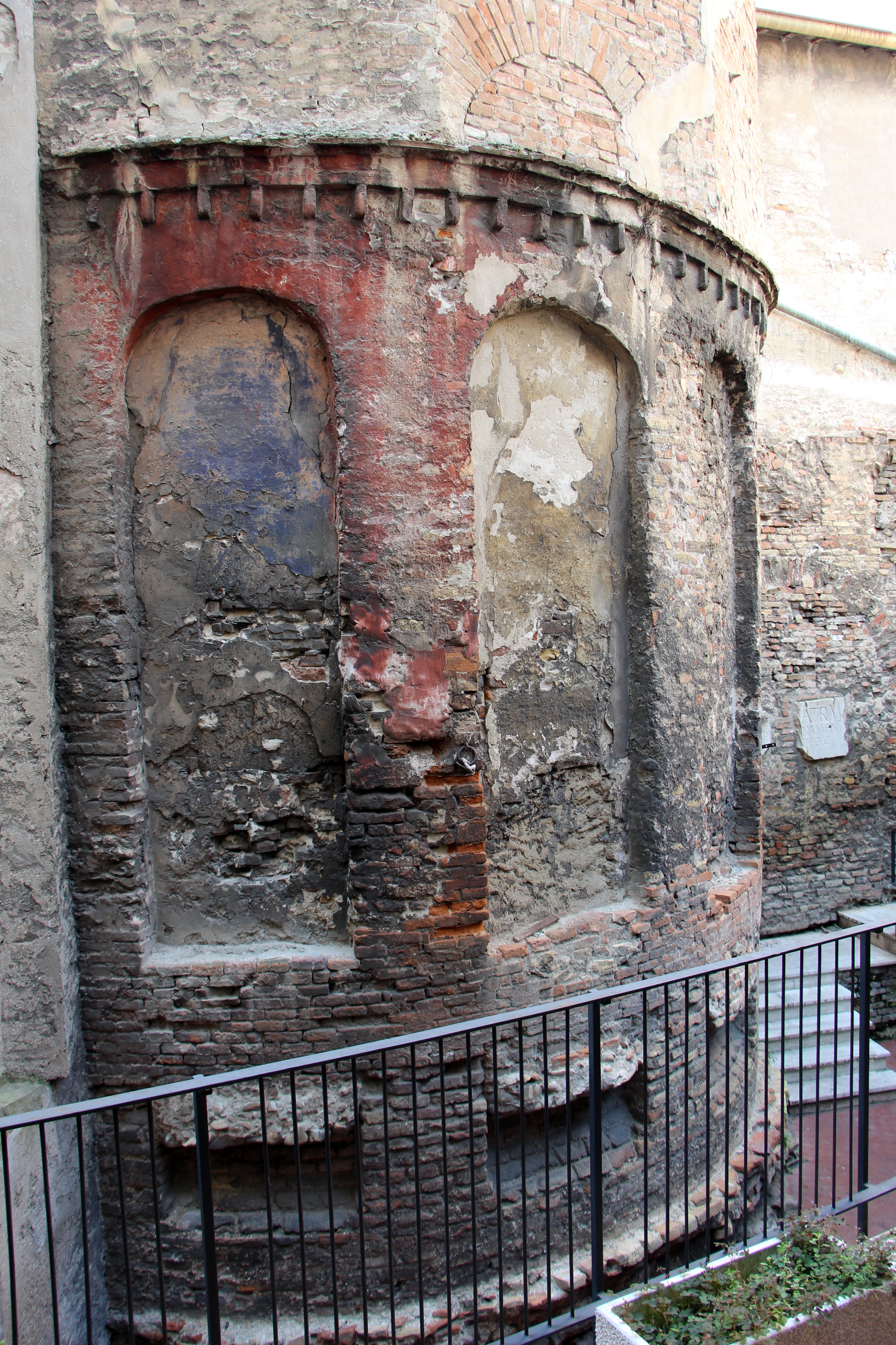 chiesa di Rimini